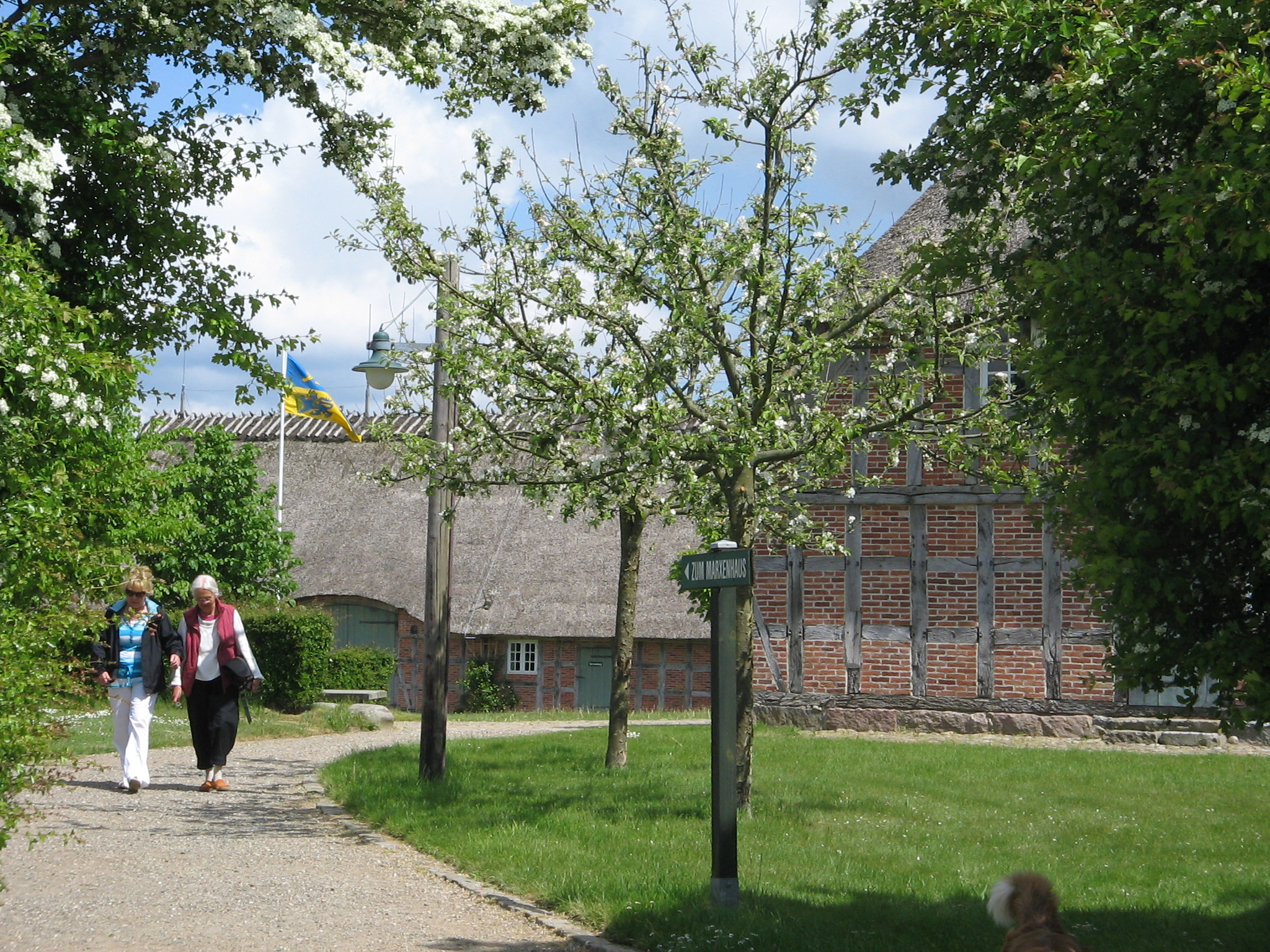 Besucher beim Marxenhaus